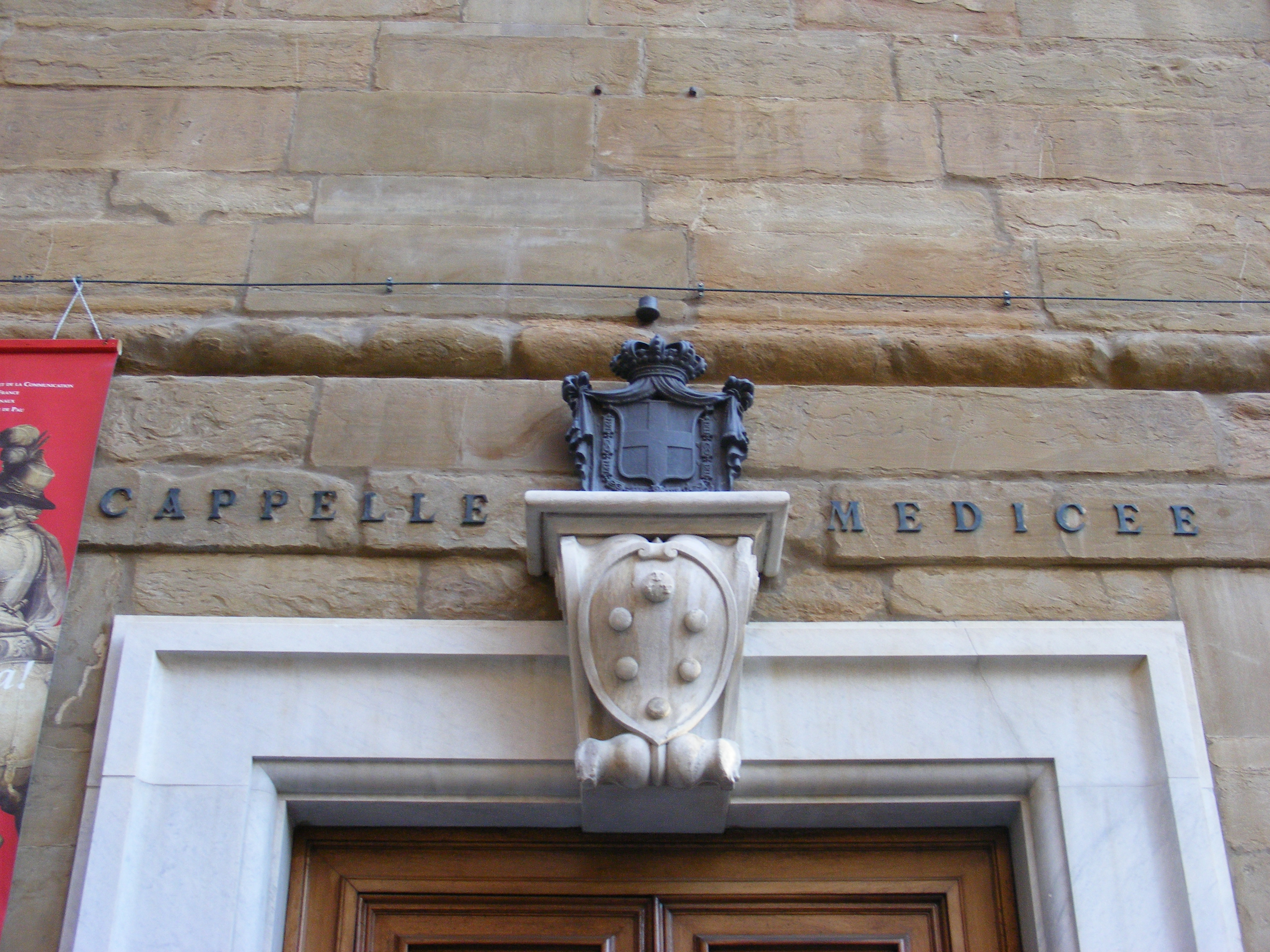 Firenze - Cappelle Medicee - targhetta